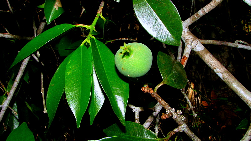 Symphonia globulifera L. f.